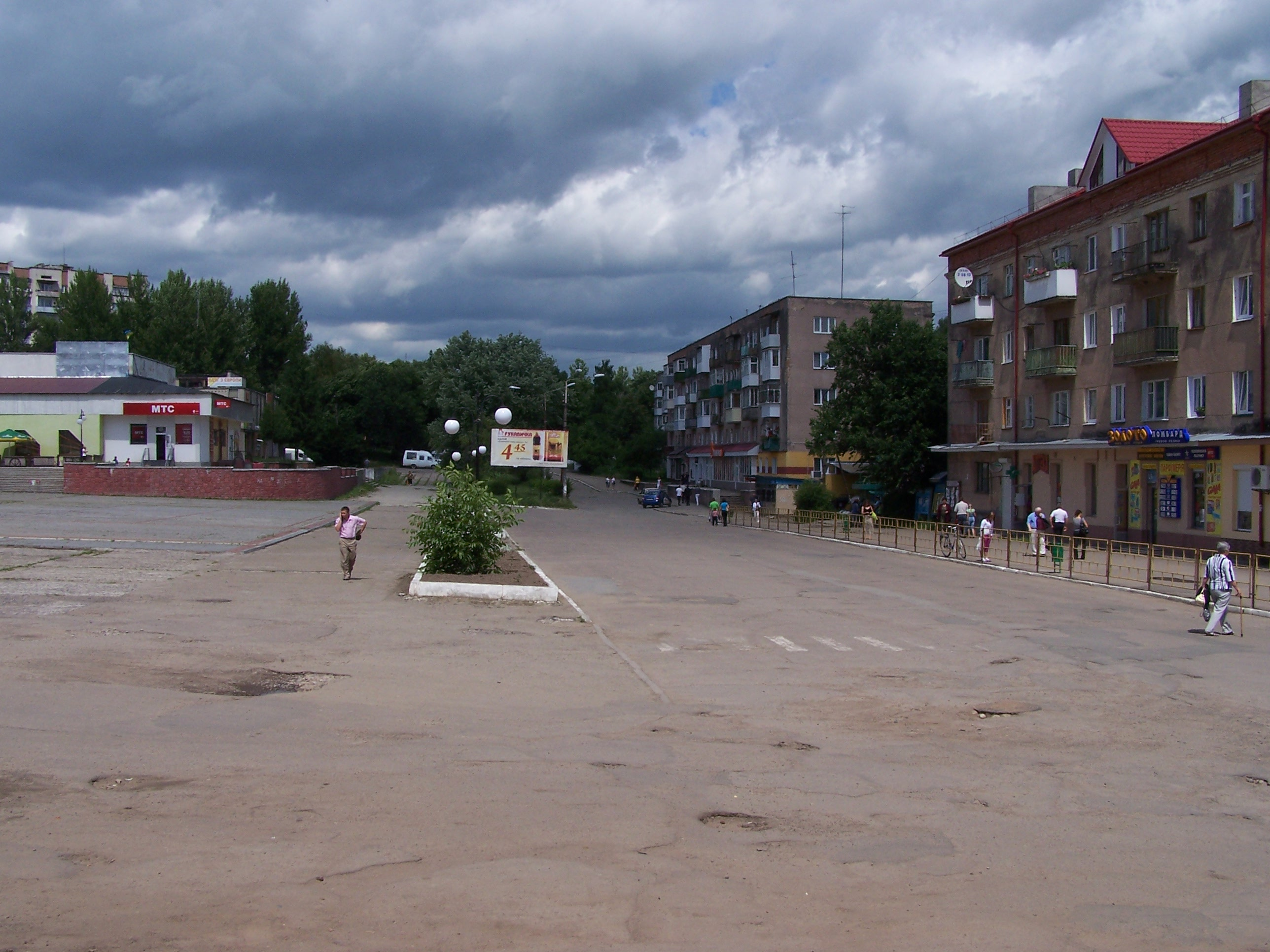 Stebnyk centrum